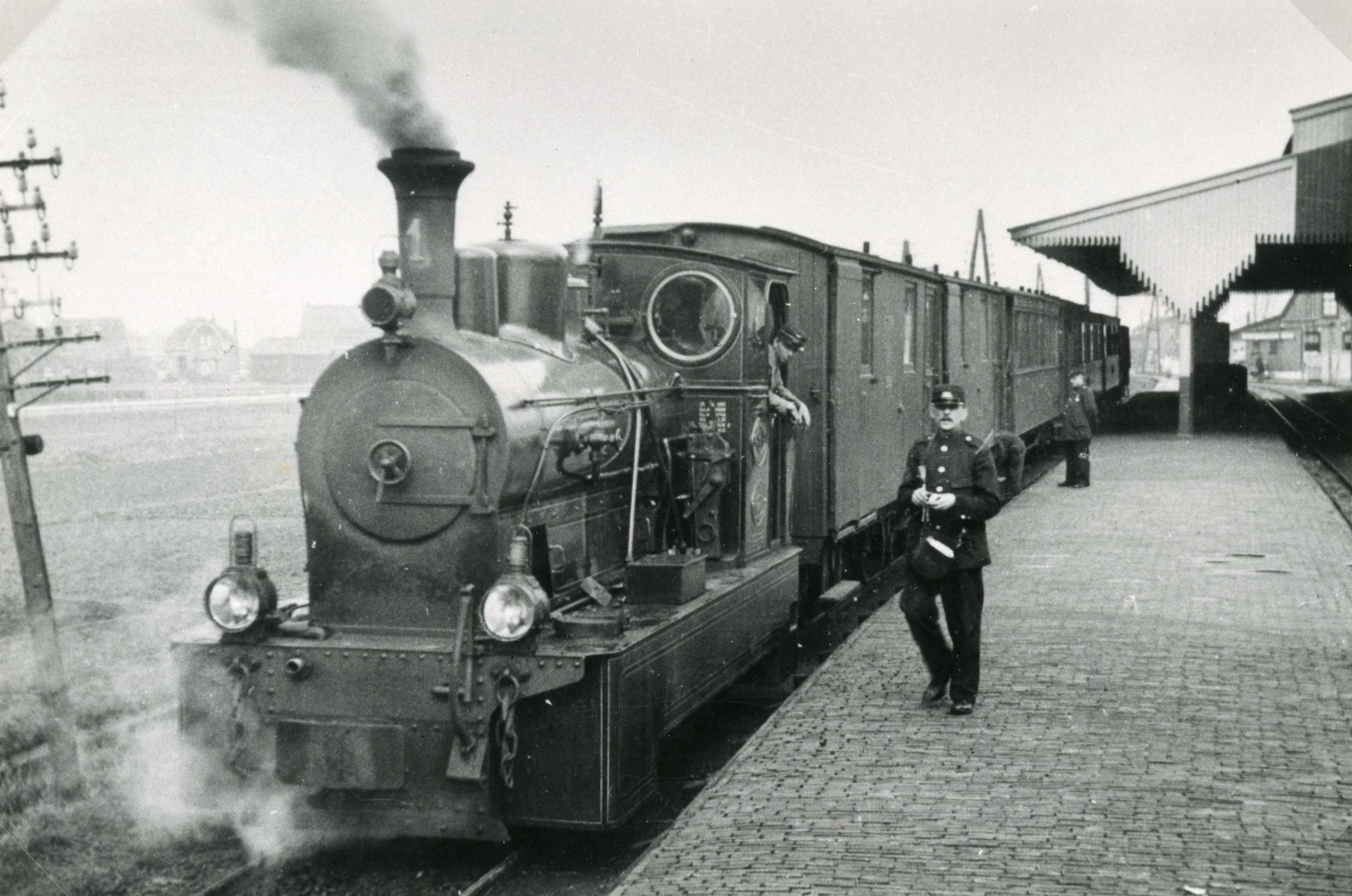 Stoomlocomotief op station Spijkenisse. RTM stoomloc no. 1 (Nieuwe serie) Ned. fabriek van werktuigen en spoorwegmaterieel, Amsterdam, fabrieksnummer 137, gebouwd en in dienst gesteld in 1905